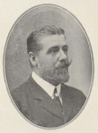 Retrato de José López Sallaberry, publicada en la revista española La Ilustración Financiera.